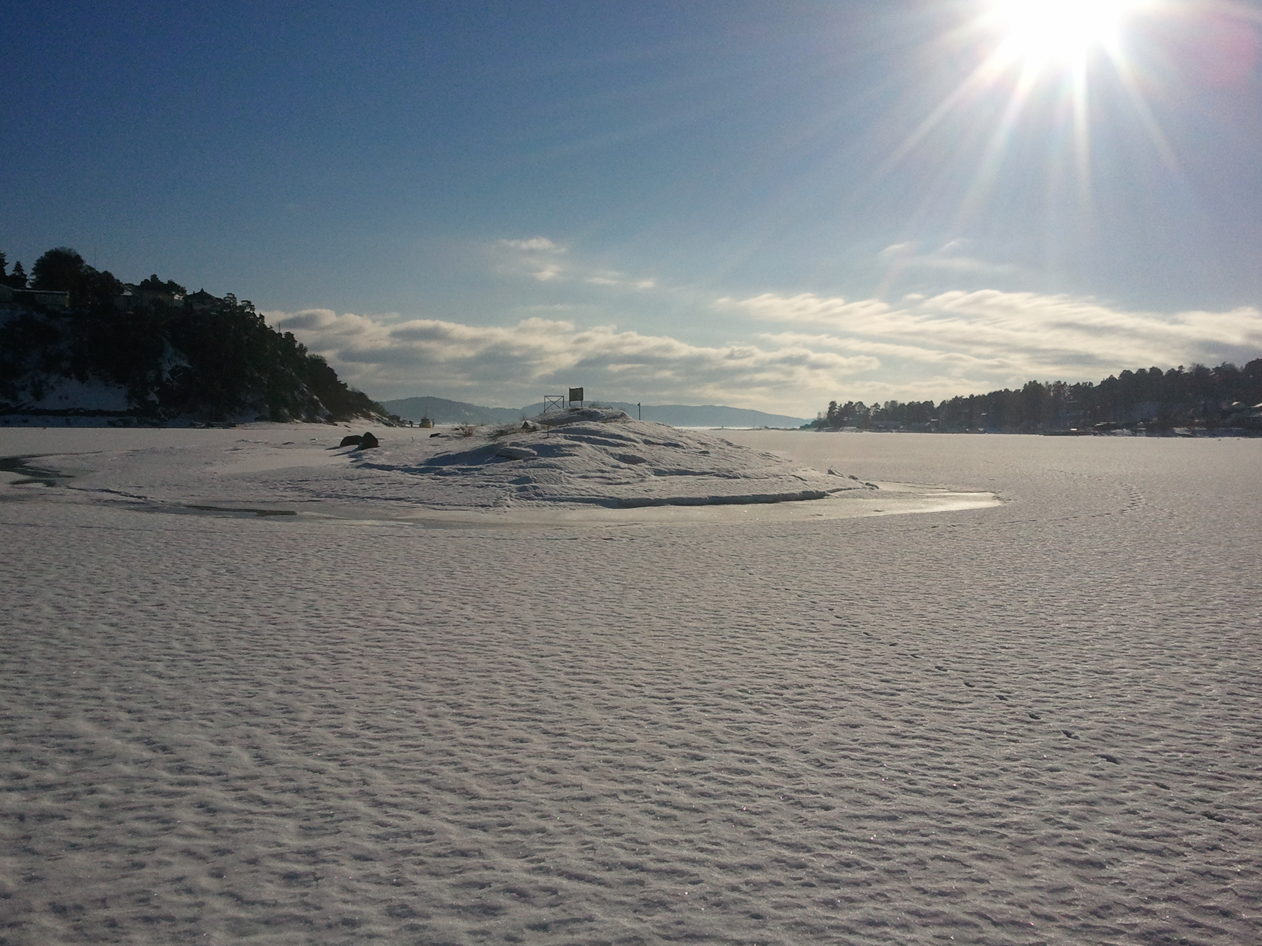 Galteskjær i Peddehavet, februar 2013